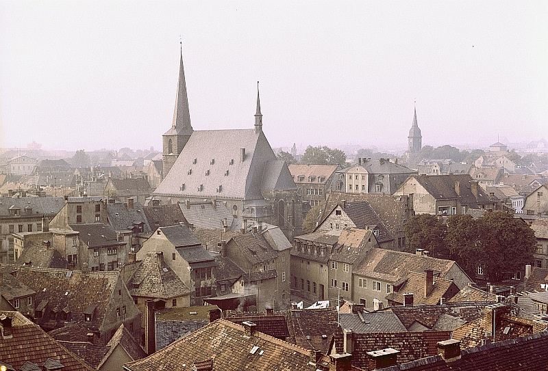 Original image description from the Deutsche Fotothek Weimar. Blick über die Dächer der Stadt zur Stadtkirche St. Peter & Paul (Herderkirche) und Jakobskirche